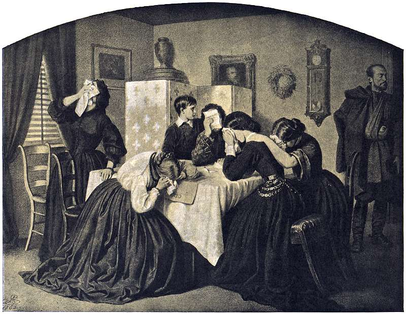 Cykl "Polonia", VIII. Żałobne wieści by Artur Grottger